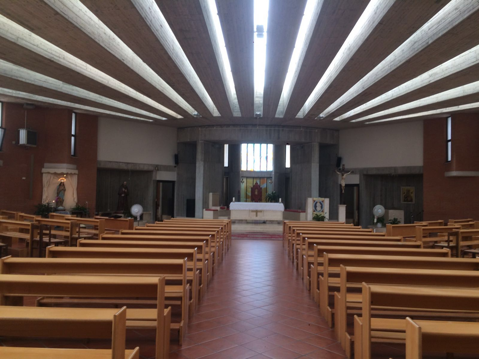 Ingresso Interno